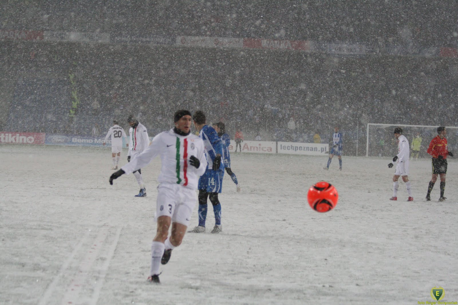 Chiellini con la maglia della Juve